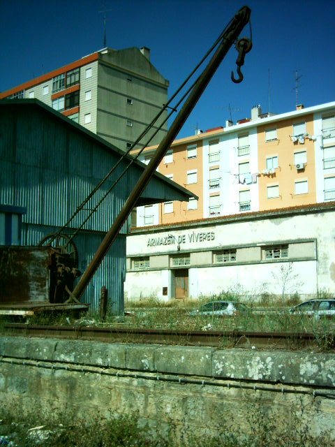 Estação do Cacém: Armazém de víveres, guindaste, e barracão de cardas, tudo demolido para o alargamento da estação, em 2013.